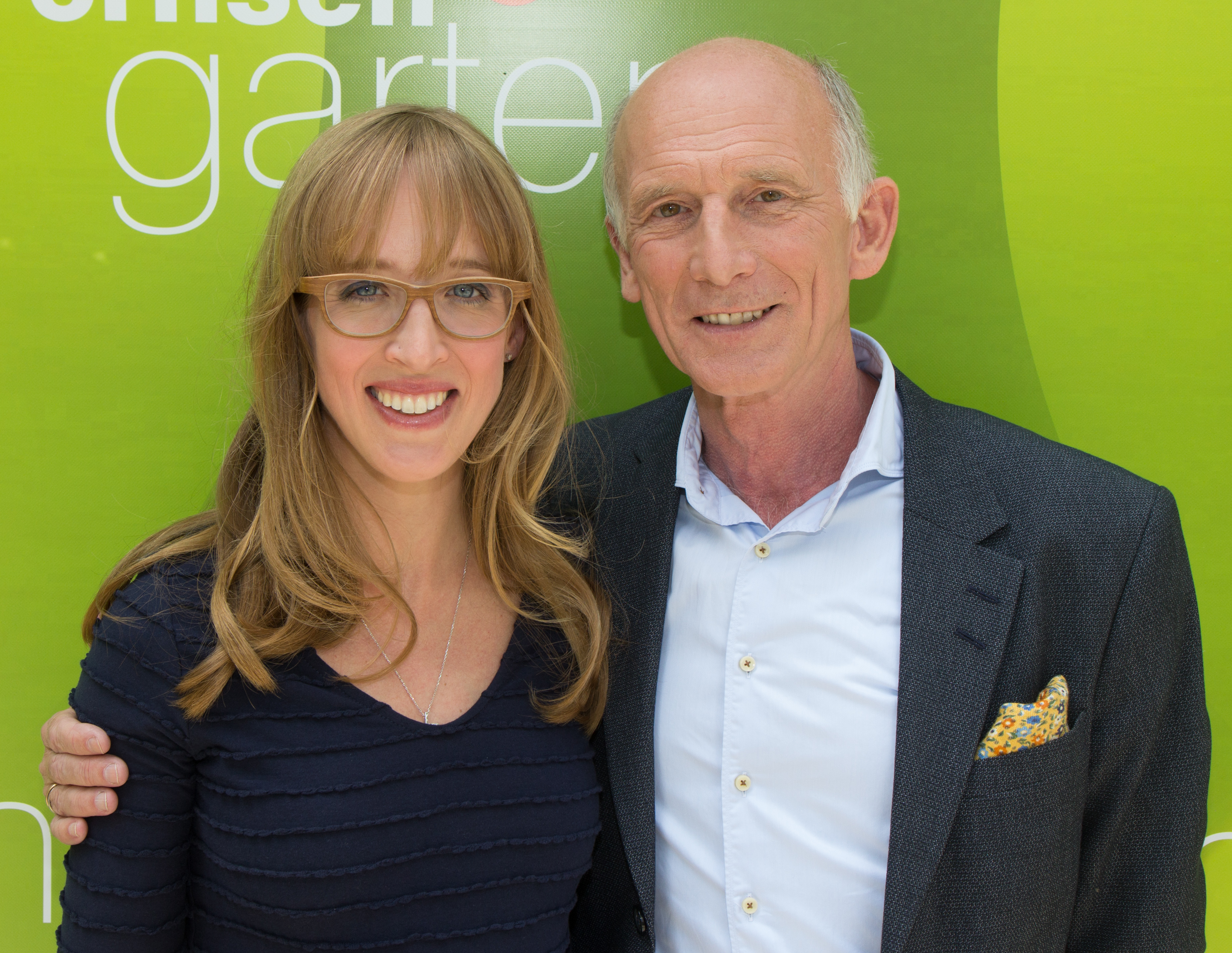 Insa Thiele-Eich als Gast beim ZDF-Fernsehgarten am 24. Juni 2018 in Mainz.